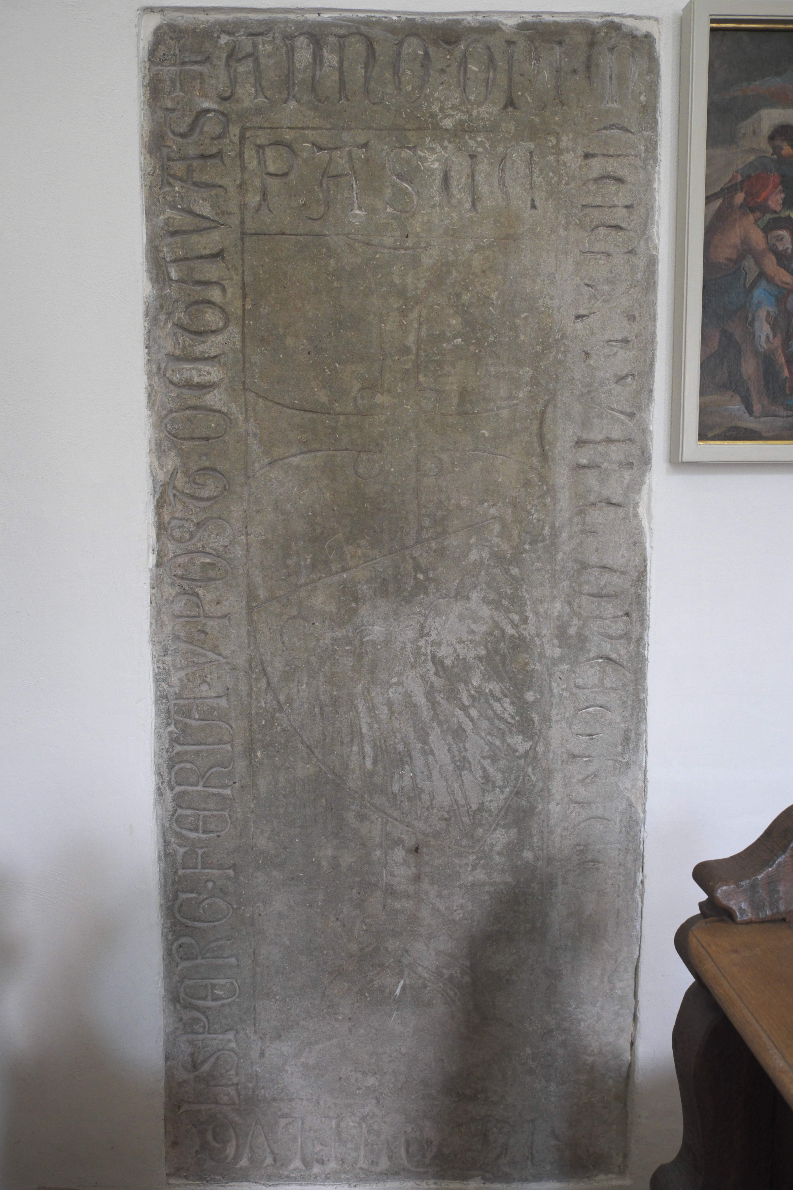 Ehemalige Johanniterkirche, heutige Pfarrkirche St. Johannes in Altmühlmünster (Riedenburg) im niederbayerischen Landkreis Kelheim (Bayern/Deutschland), Grabstein